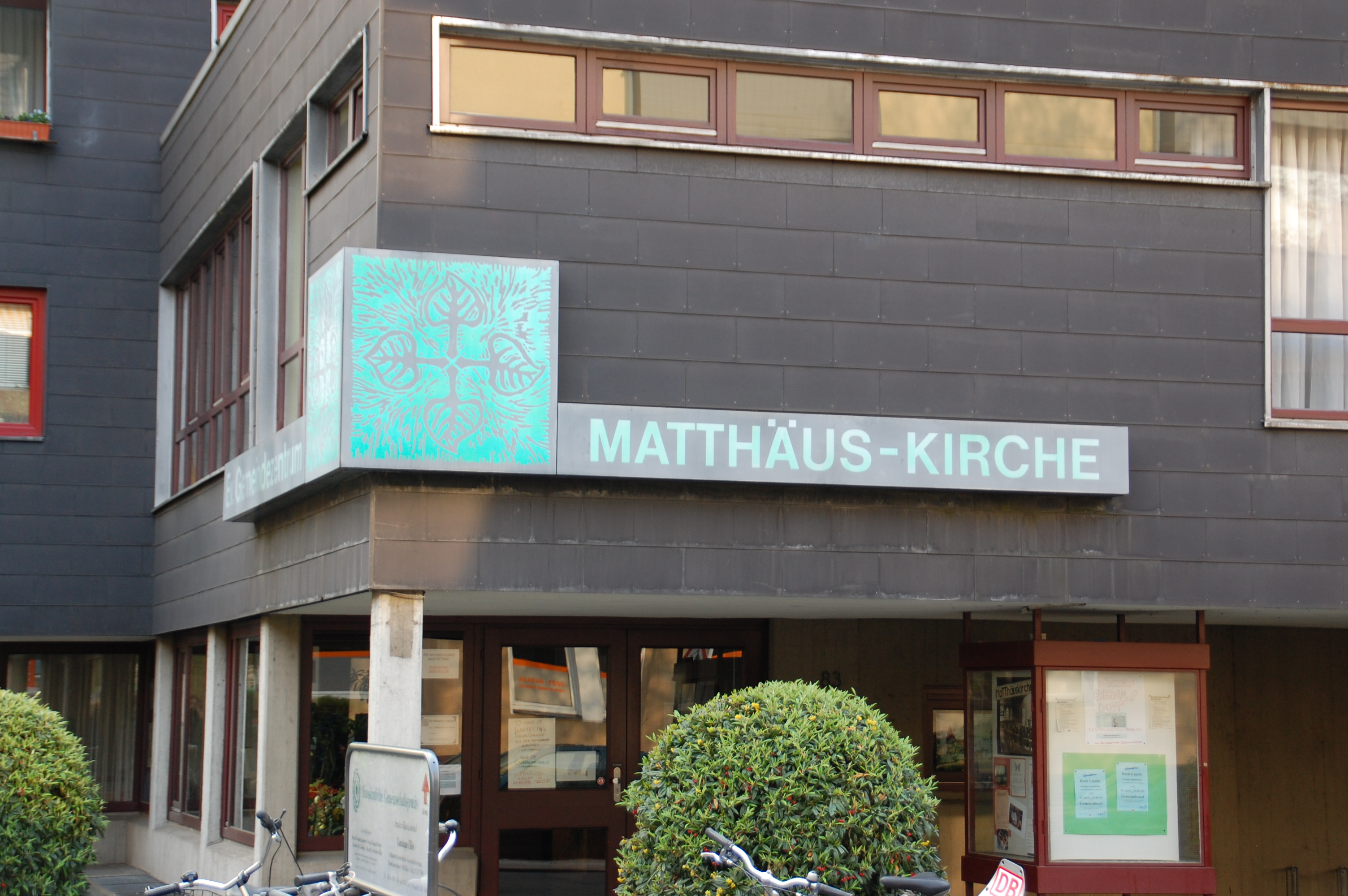 Matthäus-Kirche Lindenthal, Cologne, Germany